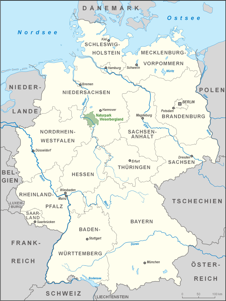 Karte des Naturpark Weserbergland Schaumburg-Hameln in Deutschland